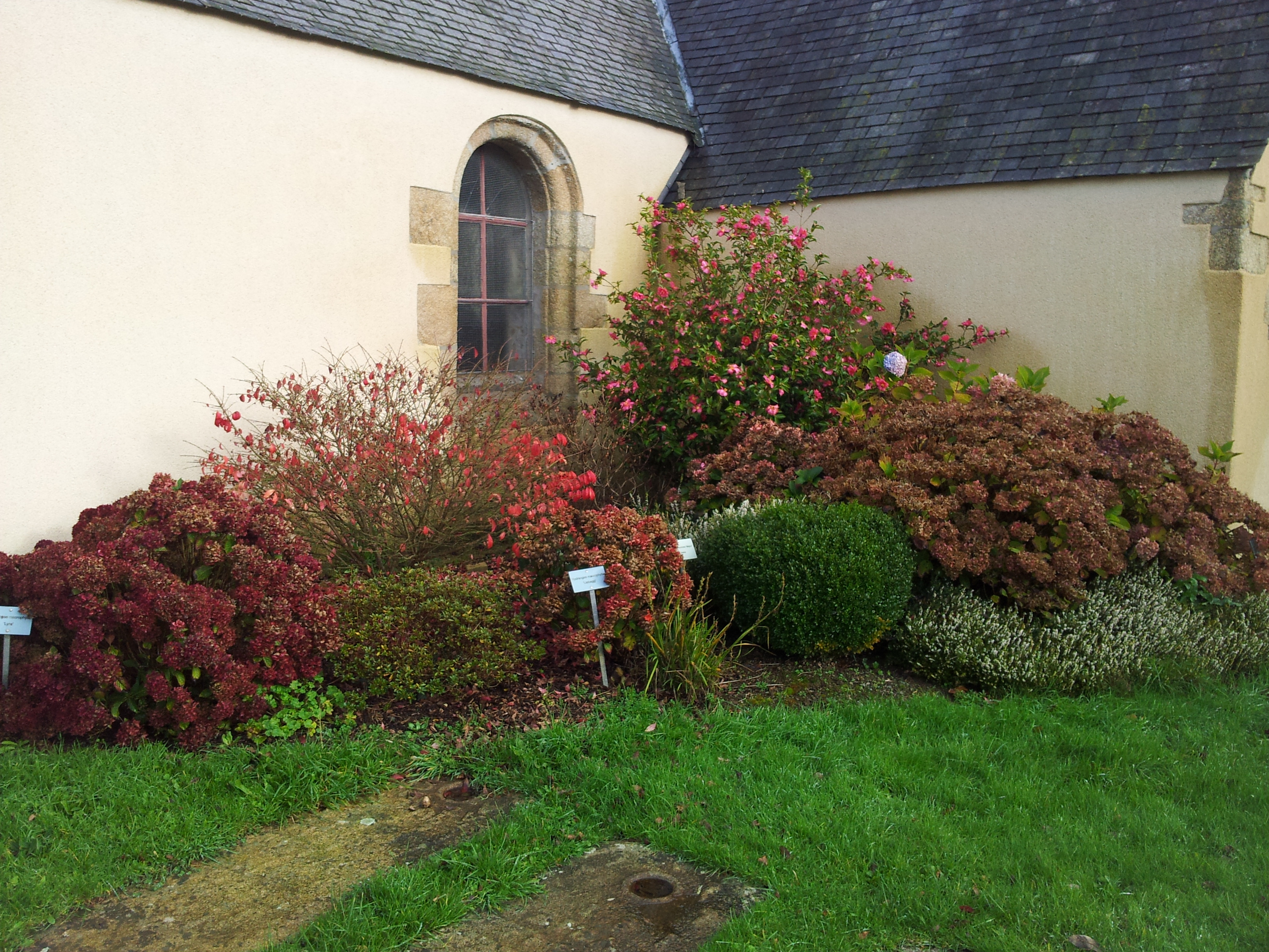 Vue latérale des fleurs (camellias) de la chapelle de Guiquelleau, Le Folgoet, France